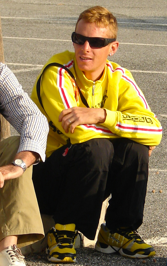 Riccardo Riccò prima della Coppa Sabatini 2007